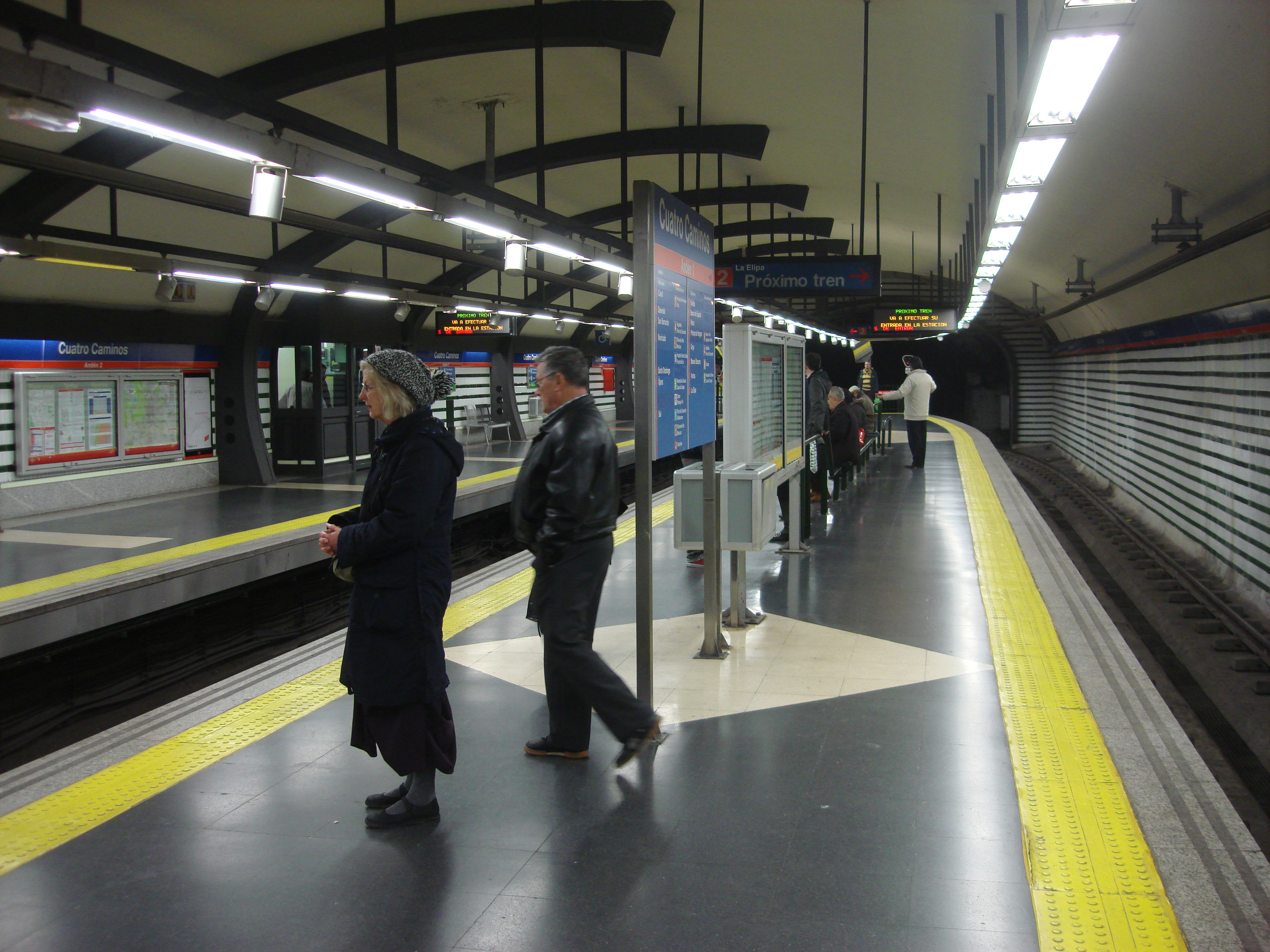 Own work